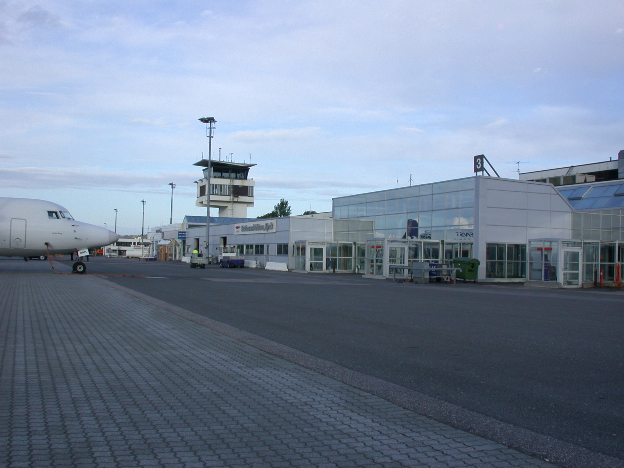 Kristiansand lufthamn, Kjevik